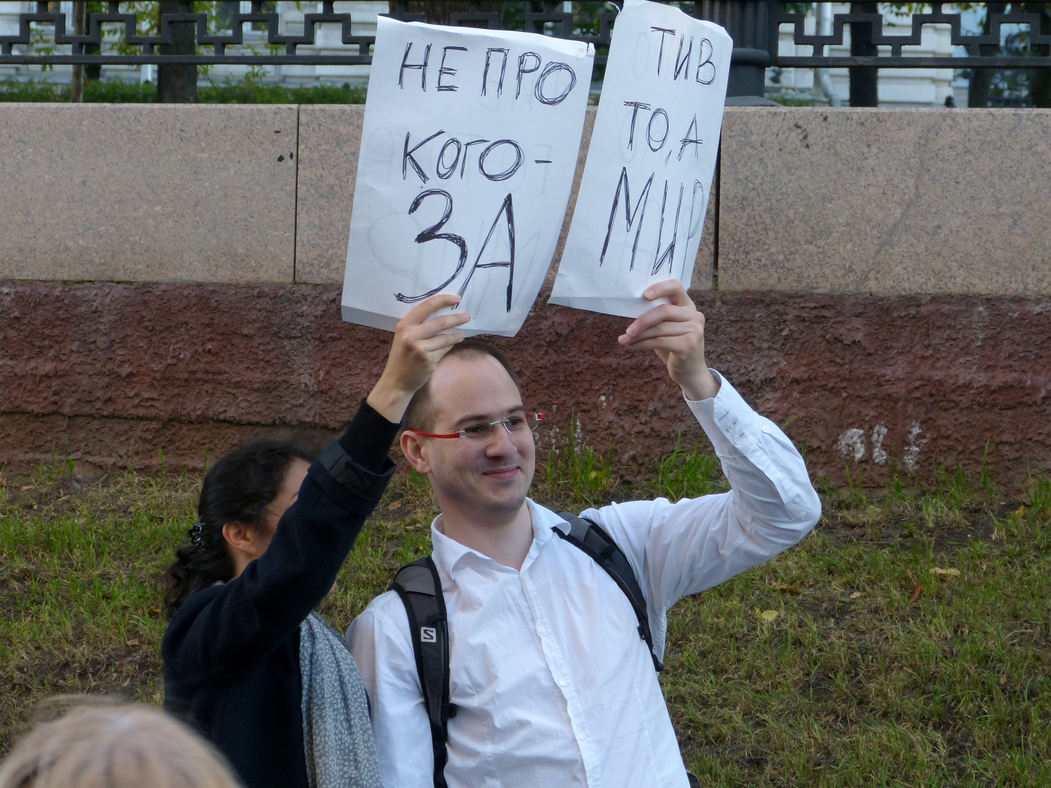 Общероссийский марш мира против вторжения войск путинского режима на Украину. Москва, Бульварное кольцо, Сретенский бульвар, 21 сентября 2014 года. Надпись на плакате: «Не против кого-то, а за мир».